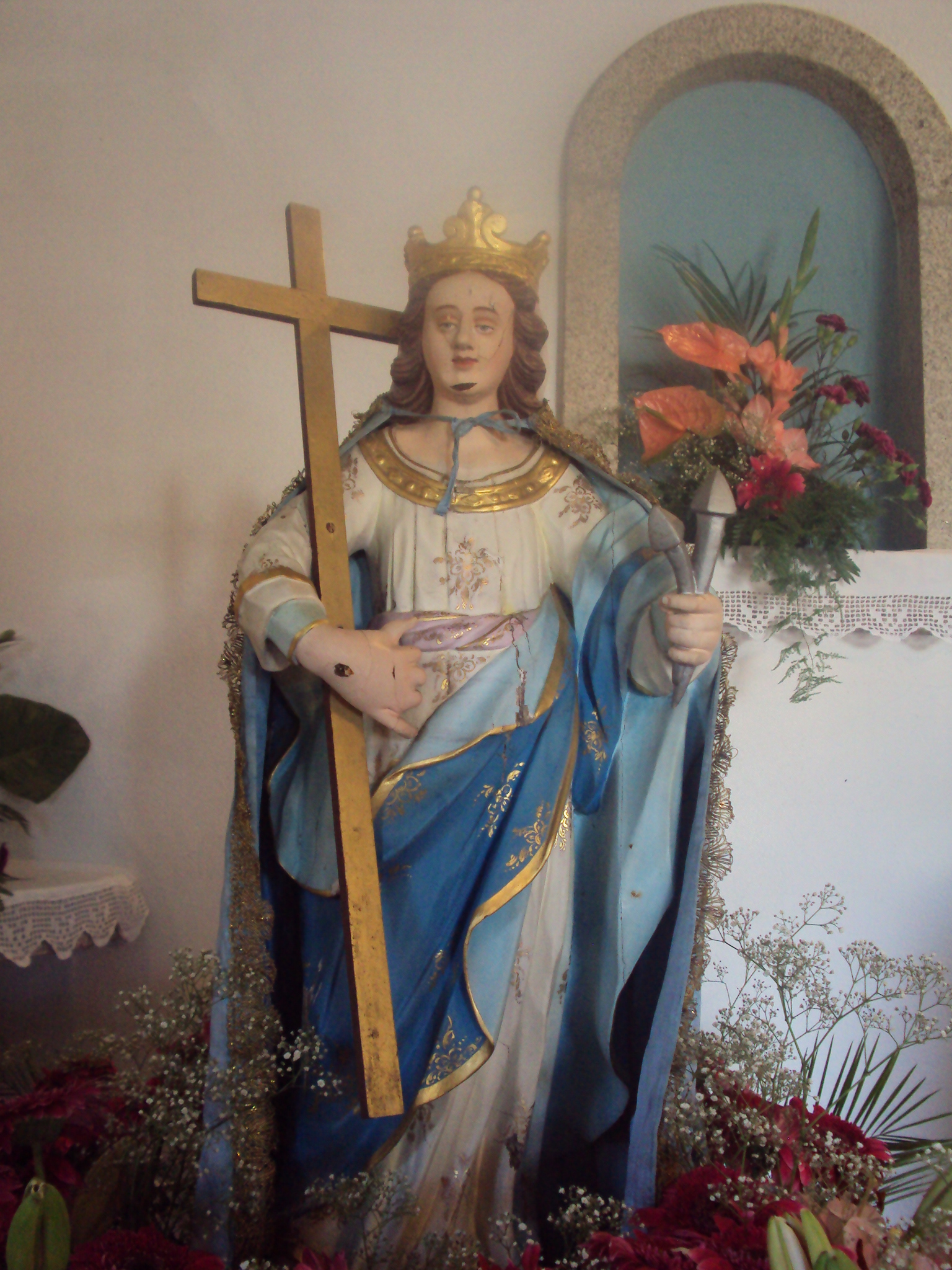 Esta imagem é de origem desconhecida e está ligada há lenda da terra. Está presente na capela de Santa Helena em Balocas, freguesia de Covas, concelho de Tábua. Imagem um pouco degrada pelo facto de ser muito antiga calculando-se ter uma idade oriunda de um século de existência. Representa Santa Helena, segurando na cruz e nos pregos de Cristo segundo a tradição cristã e uma coroa pois ela foi imperatriz de Constatinopla.